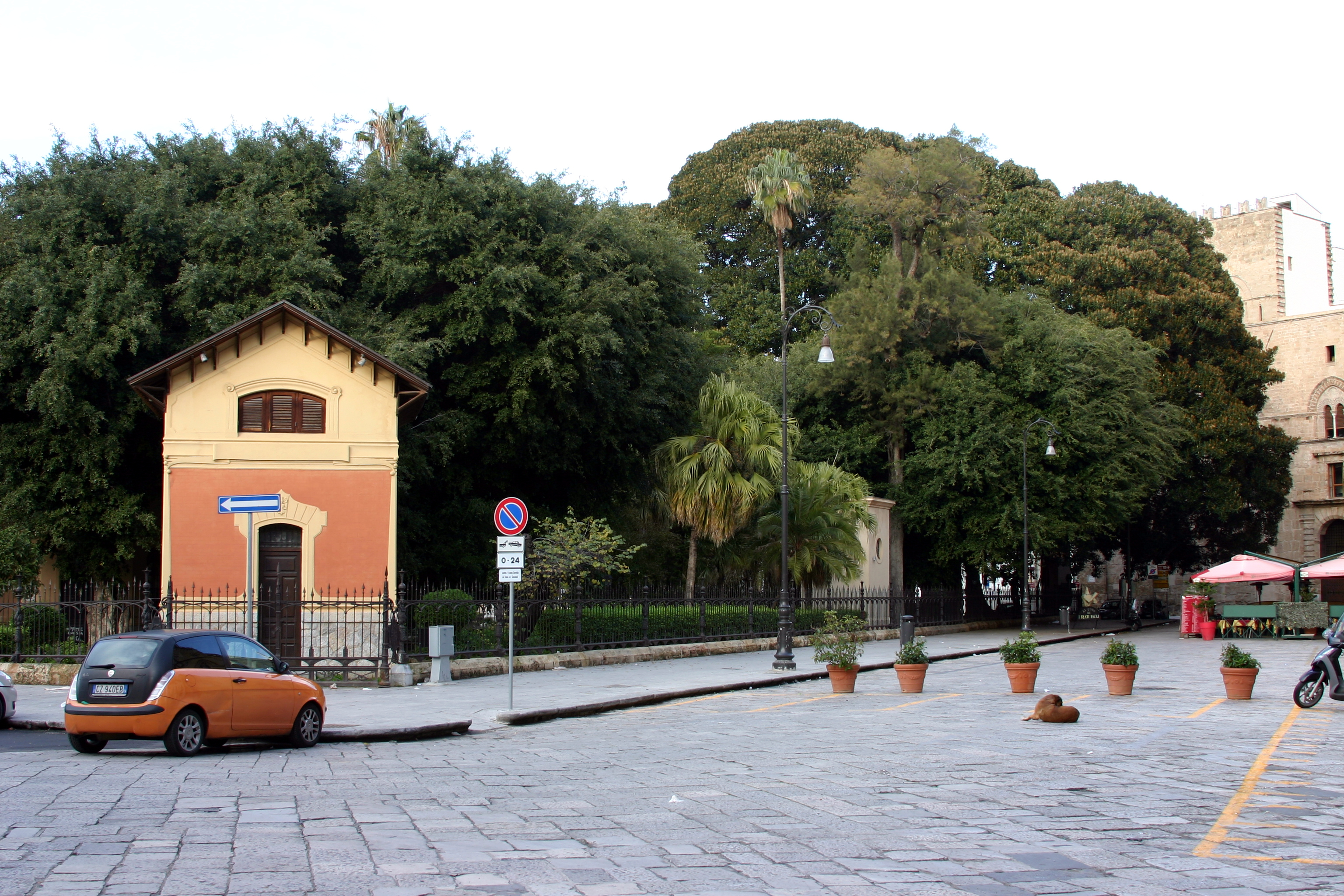 Piazza Marina - Palermo